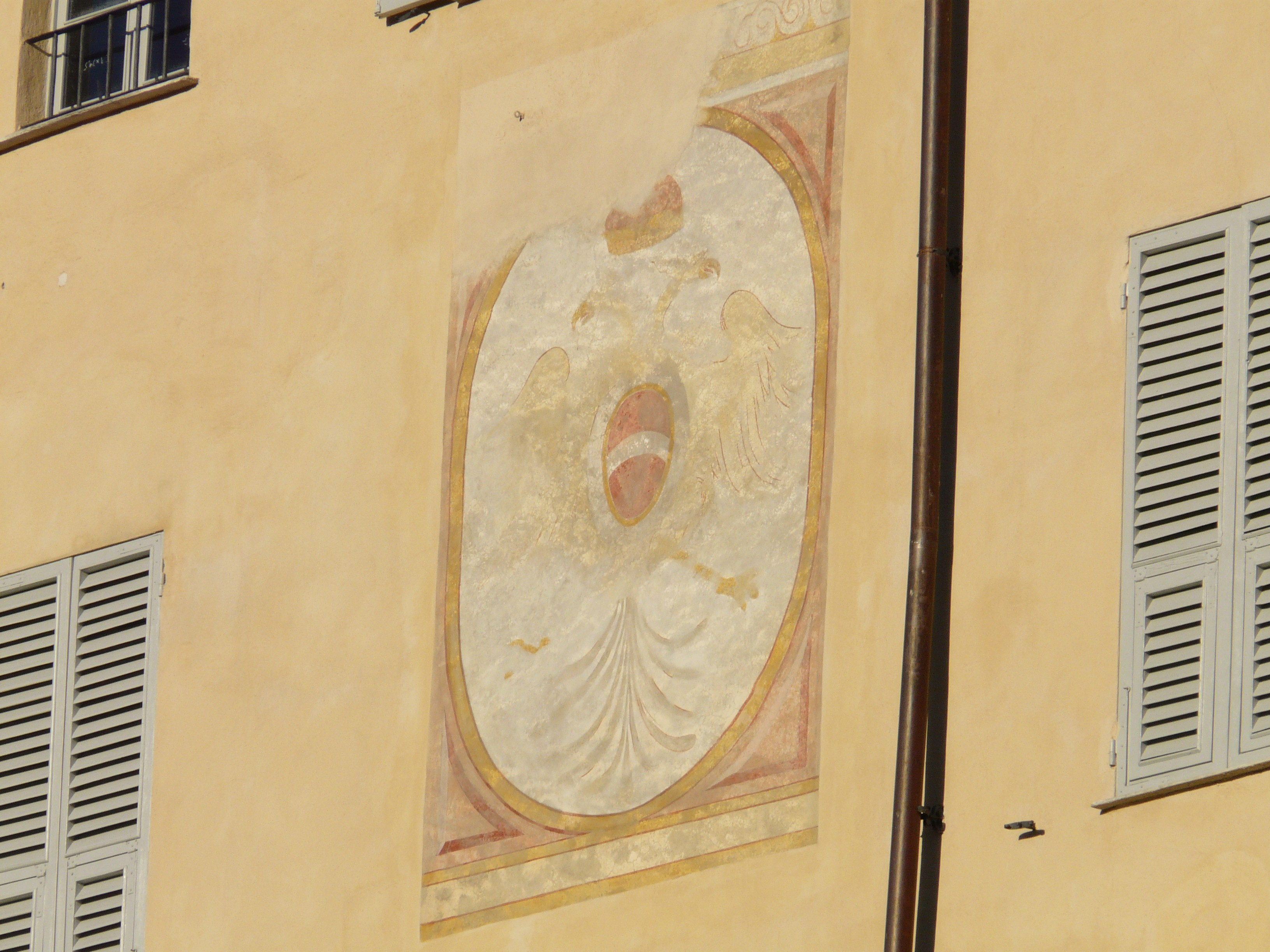 Affresco del Castello di Garlenda, Liguria, Italia